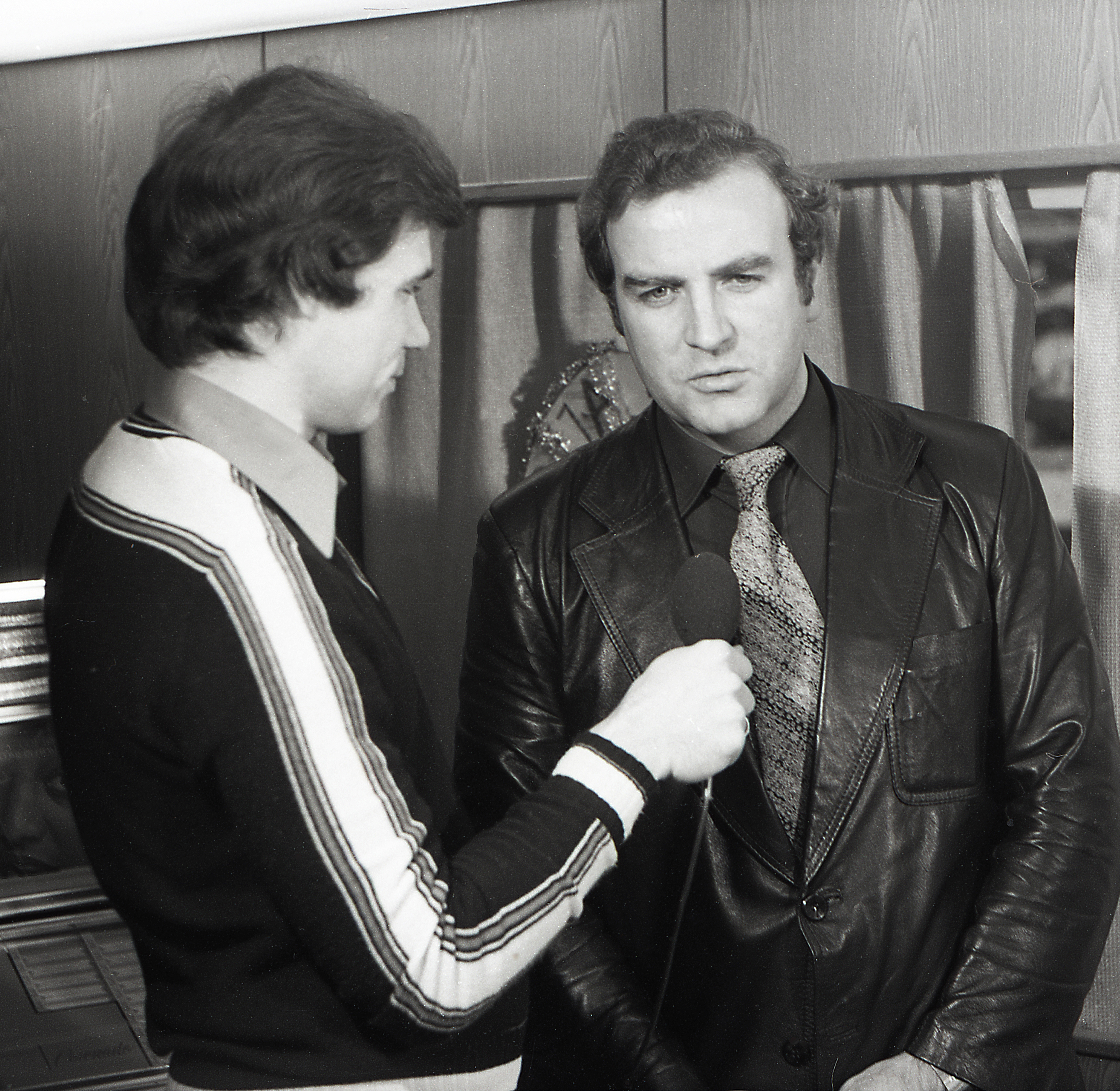 Kalev Vapper ja Eedo Raide 1980. aastal